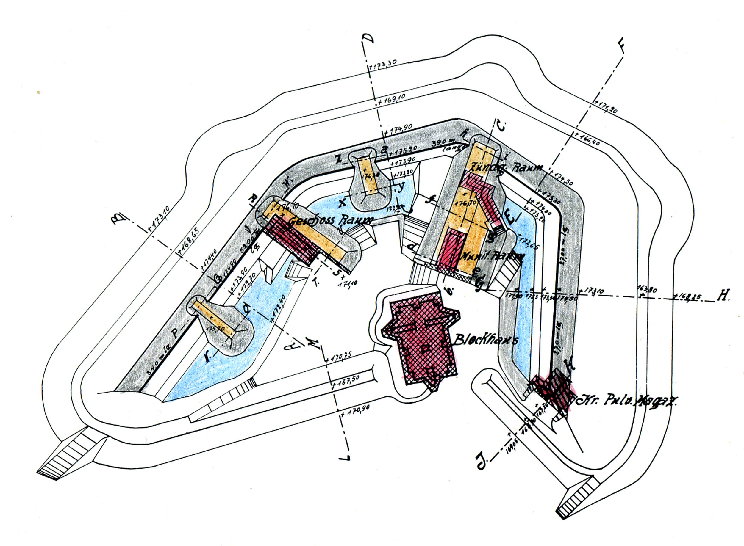 Plan des Entfestigungsamts Koblenz zur Entfestigung der Schanze Großfürst Alexander in Koblenz